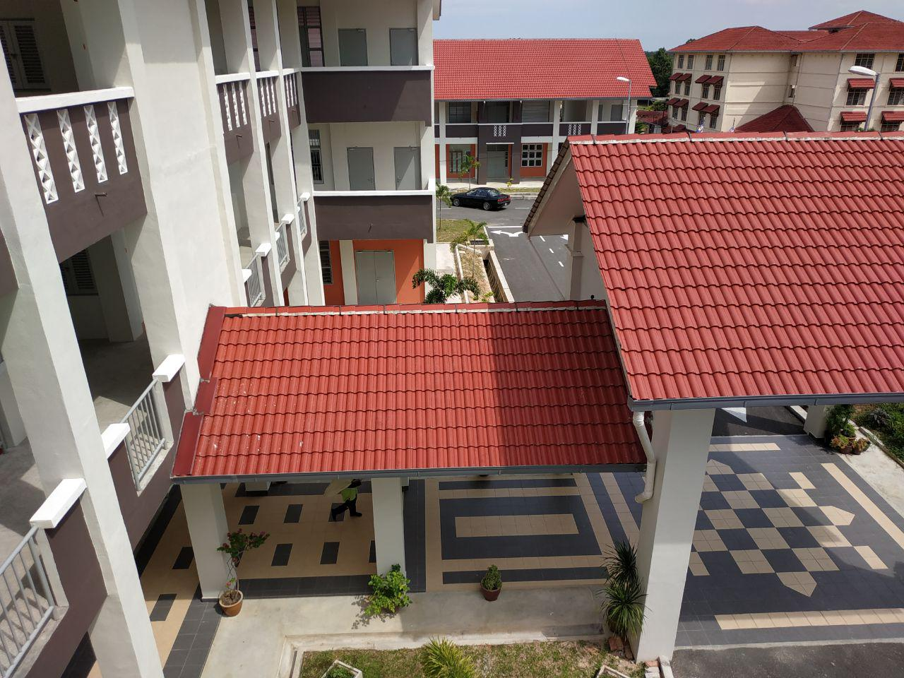 SMA JAIM ASSYAKIRIN